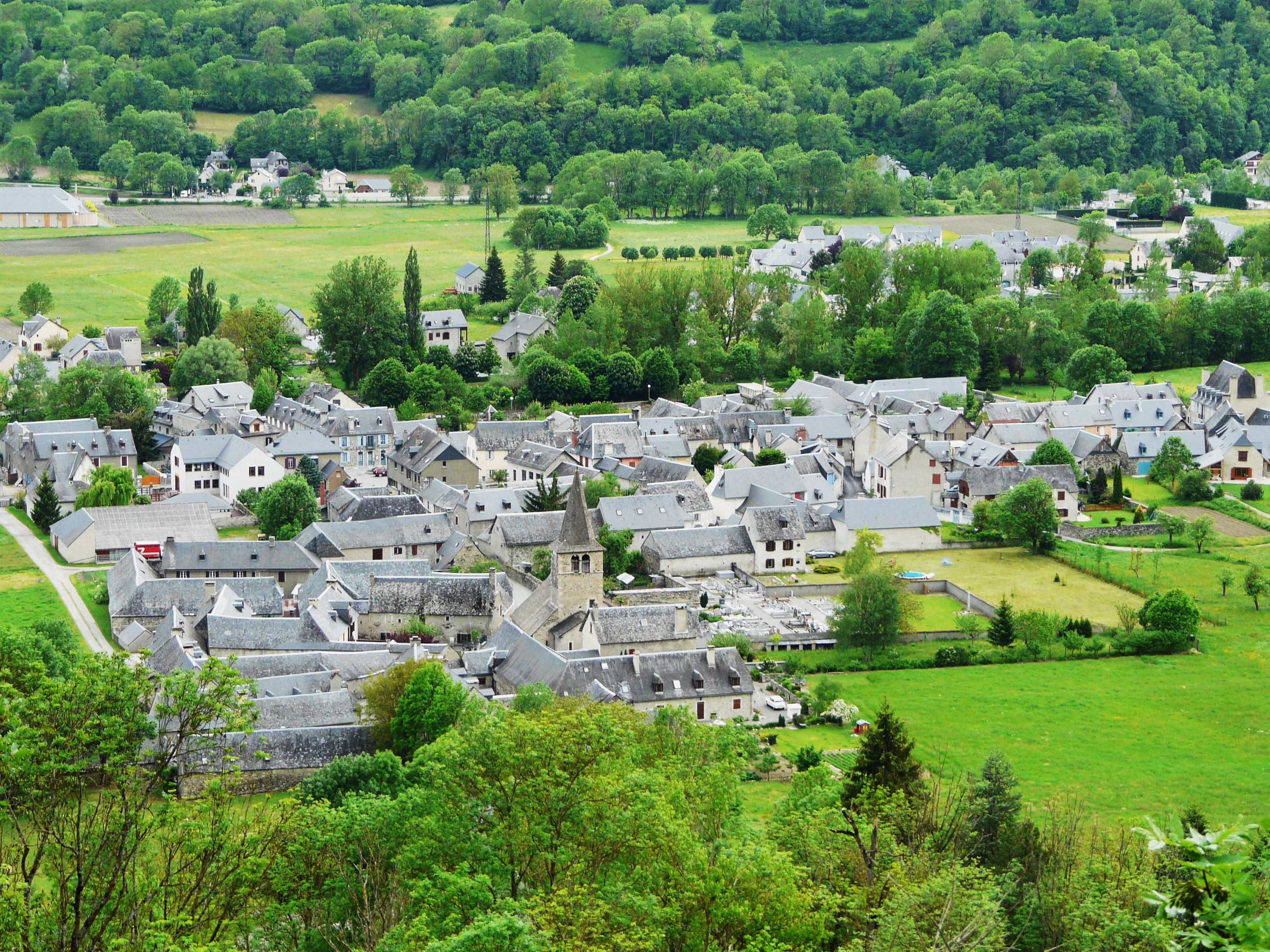 Le village de Vielle-Aure vu depuis le nord-est, Hautes-Pyrénées, France.